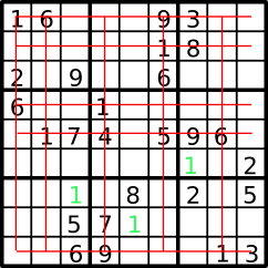 Udelukkelse i rækker og kolonner